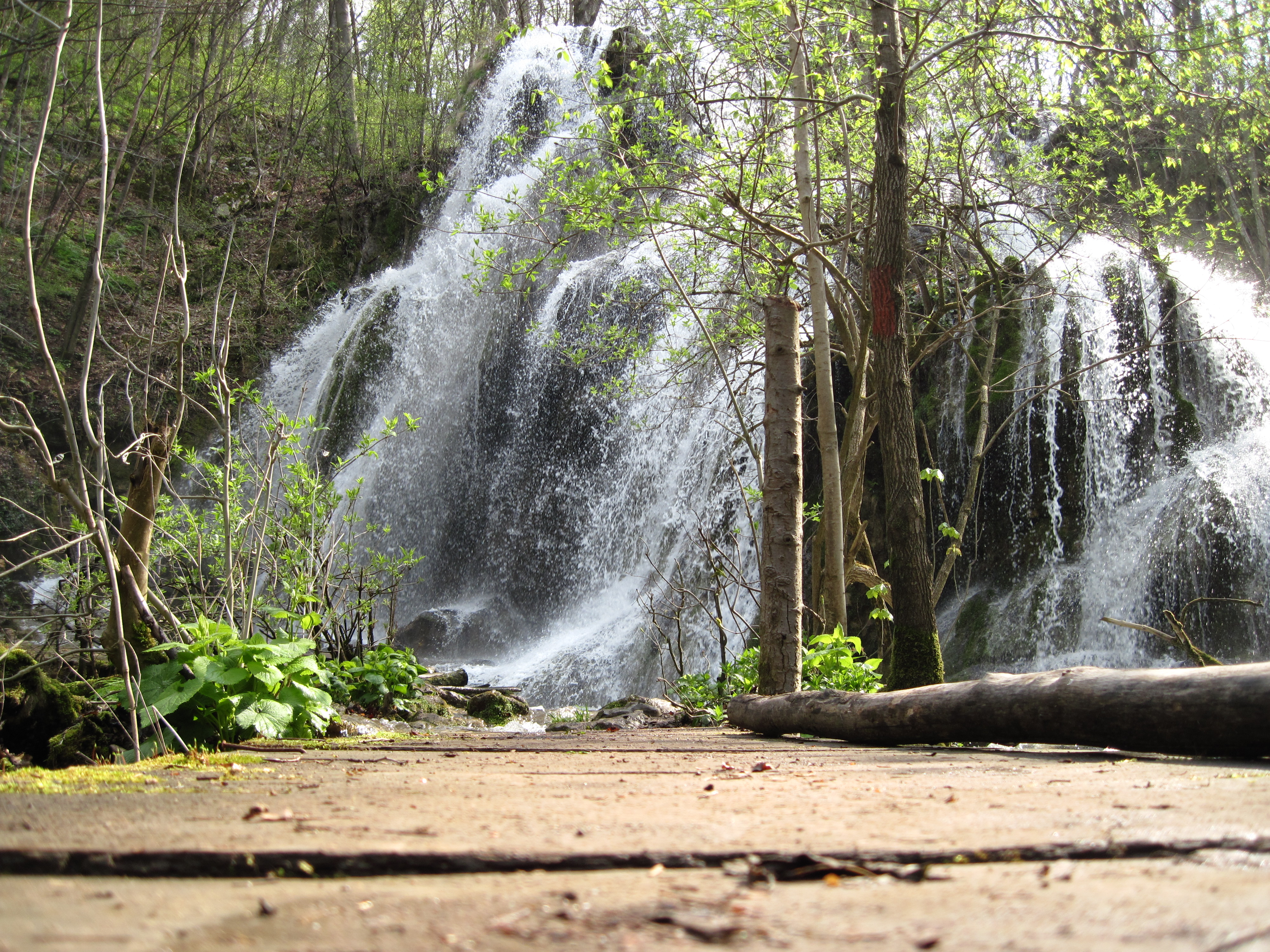 Parcul National Cheile Nerei-Beusnita, caras-Severin, Romania